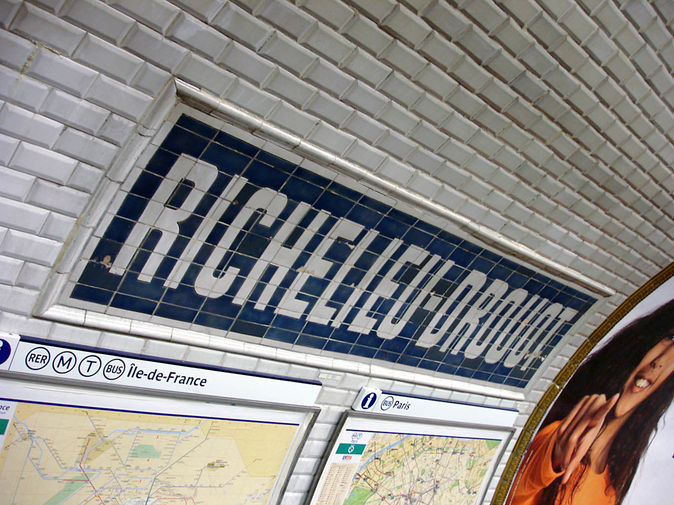 Station Richelieu - Drouot de la ligne 9 du métro de Paris, France.